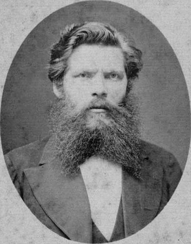 Muuseumikogu Fotokogu Olemus foto Originaal originaal Säilivus rahuldav